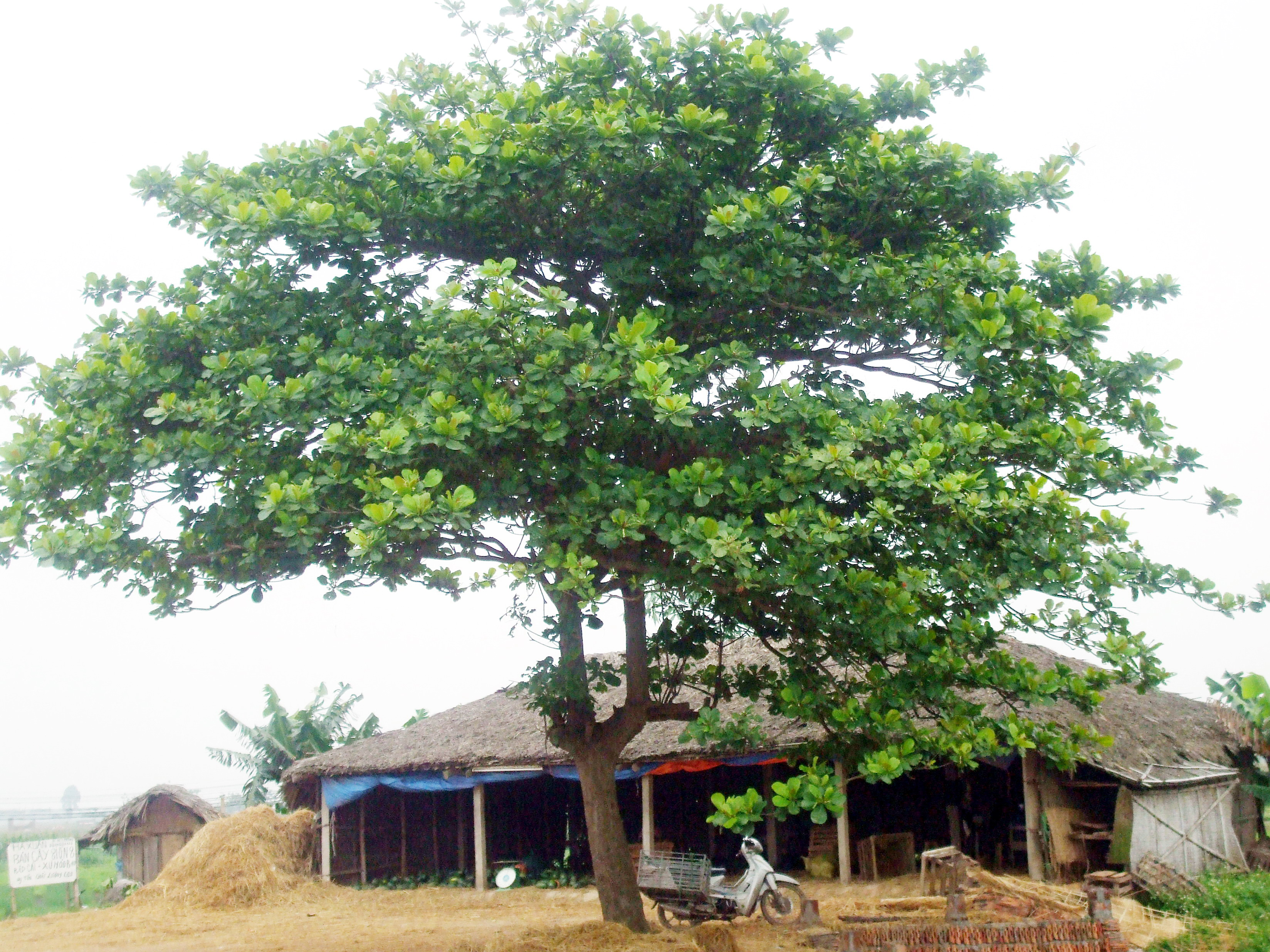 Một cây bàng ở Bình Định, Việt Nam.